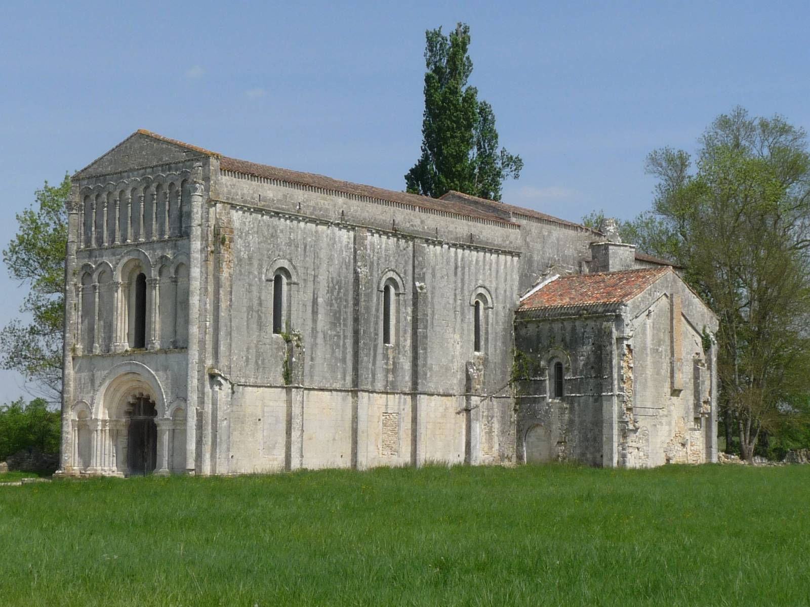 Abbaye de Châtre, St-Brice, Charente, France